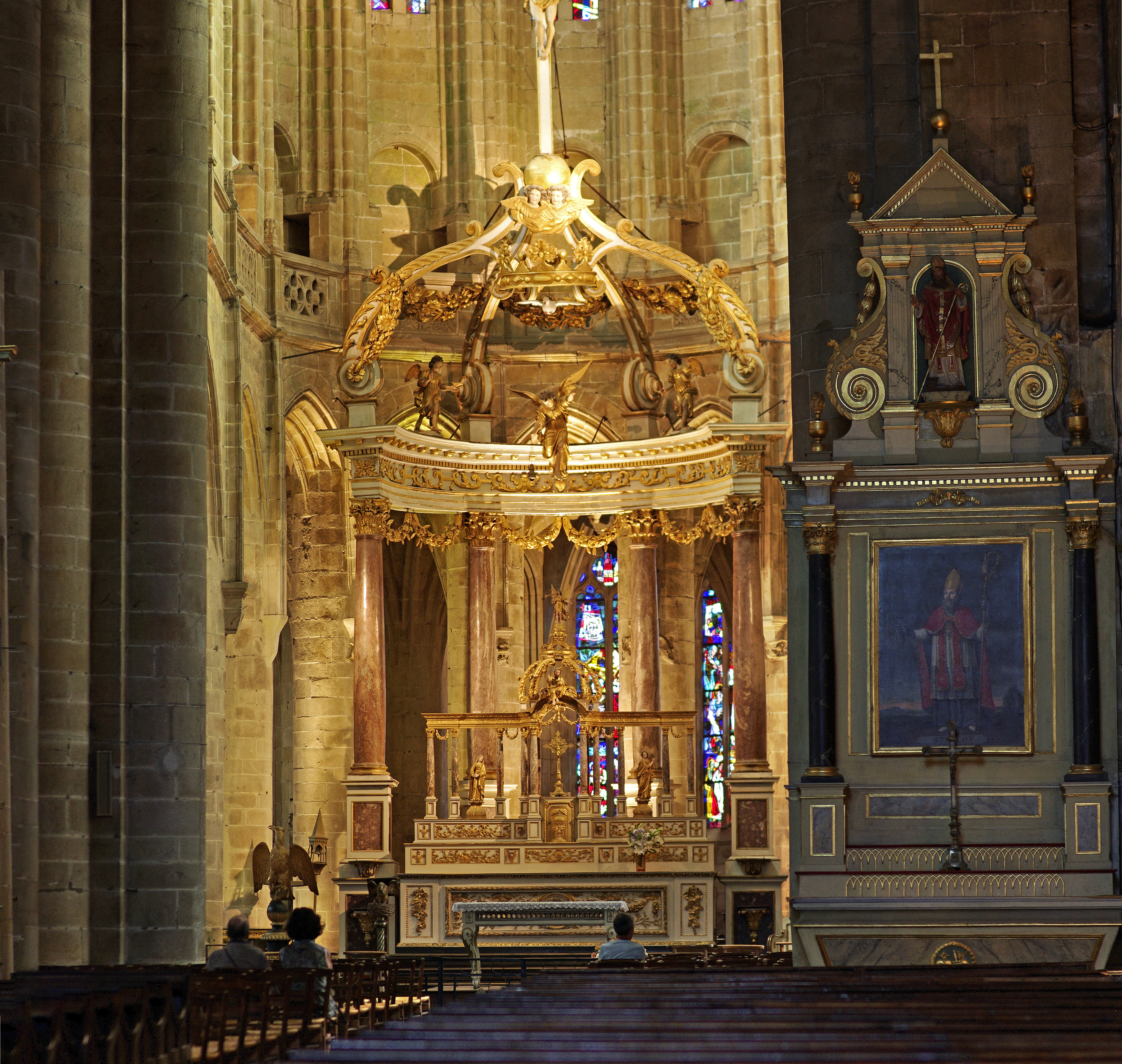 Dinan (Côtes-d'Armor) Basilique Saint-Sauveur. Dans le choeur, le maître-autel avec retable à baldaquin. Le maître-autel, en bois et marbre, date des XVII-XVIII-XIXème siècle : l'autel date du XVIème siècle, le retable est dessiné en 1712 par l'architecte Garengeau, le baldaquin est érigé à partir de 1744. "Le dessin en fut exécuté en 1718 par l'archictecte Garengeau et examiné et peut-être modifié la même année par Hardouin, architecte et contrôleur des bâtiments du Roi, et par Huguet, architecte. L’adjudication des travaux fut faite aussitôt à François Lamandé et Jean Lemonnier, mais attaquée par Bertrand Frostin, maître menuisier à Rennes. Après procès, les premiers sculpteurs demeurèrent adjudicataires ainsi que l’indiquent les comptes de 1736 qui nous font connaître également que le dessin définitif avait été exécuté par Jacques Le Bonhomme, de Saint-Malo. Toute cette oeuvre, qui comprend le tabernacle, la colonnade de part et d’autre et le petit dôme qui le surmonte, est d’une pureté de lignes et d’une exécution remarquable. En 1744, le maître-autel fut déplacé et on décida de l’augmenter, travaux confiés à Maisonneuve-Thomas et François Lamandé. En examinant l’autel à double face, qui devait se trouver au bas du choeur actuel et qui fut sans doute transporté alors à l’emplacement qu’il occupe aujourd’hui, l’on voit que les nouveaux travaux consistaient dans la haute colonnade avec le dôme la surmontant et l’ange thuriféraire. Enfin, en 1756, devis de la dorure était dressé par Allix, doreur à Saint-Malo, mais l’adjudication en fut faite à Durocher-Thomas et Pierre Morillon, qui promettaient en outre de faire des statuettes d’anges. Ces dernières sont d’une facture nettement inférieure au reste de ce beau monument." (